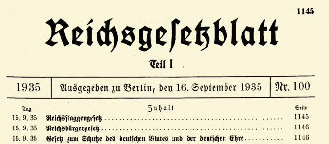 Titelblatt des RGBl. Teil I Nr. 100/1935 - Inhaltsverzeichnis